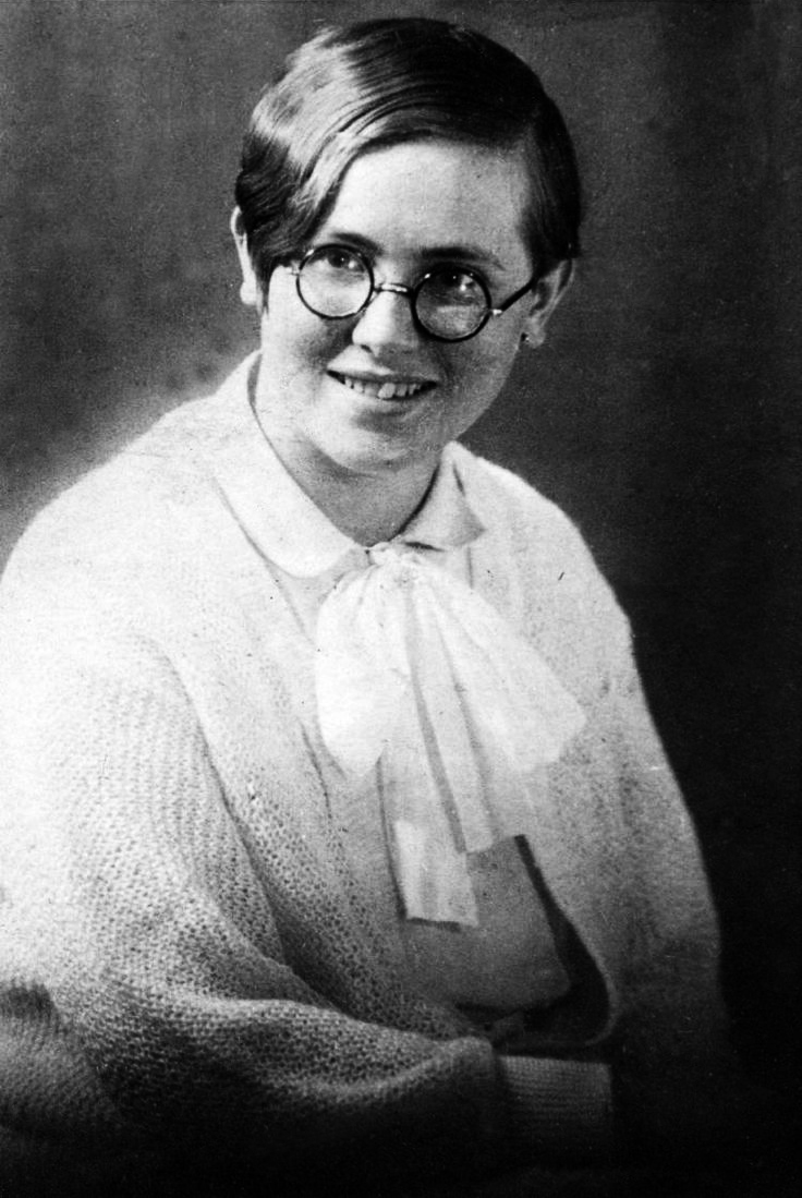 Judith Auer, résistante allemande au Nazisme exécutée en 1944.